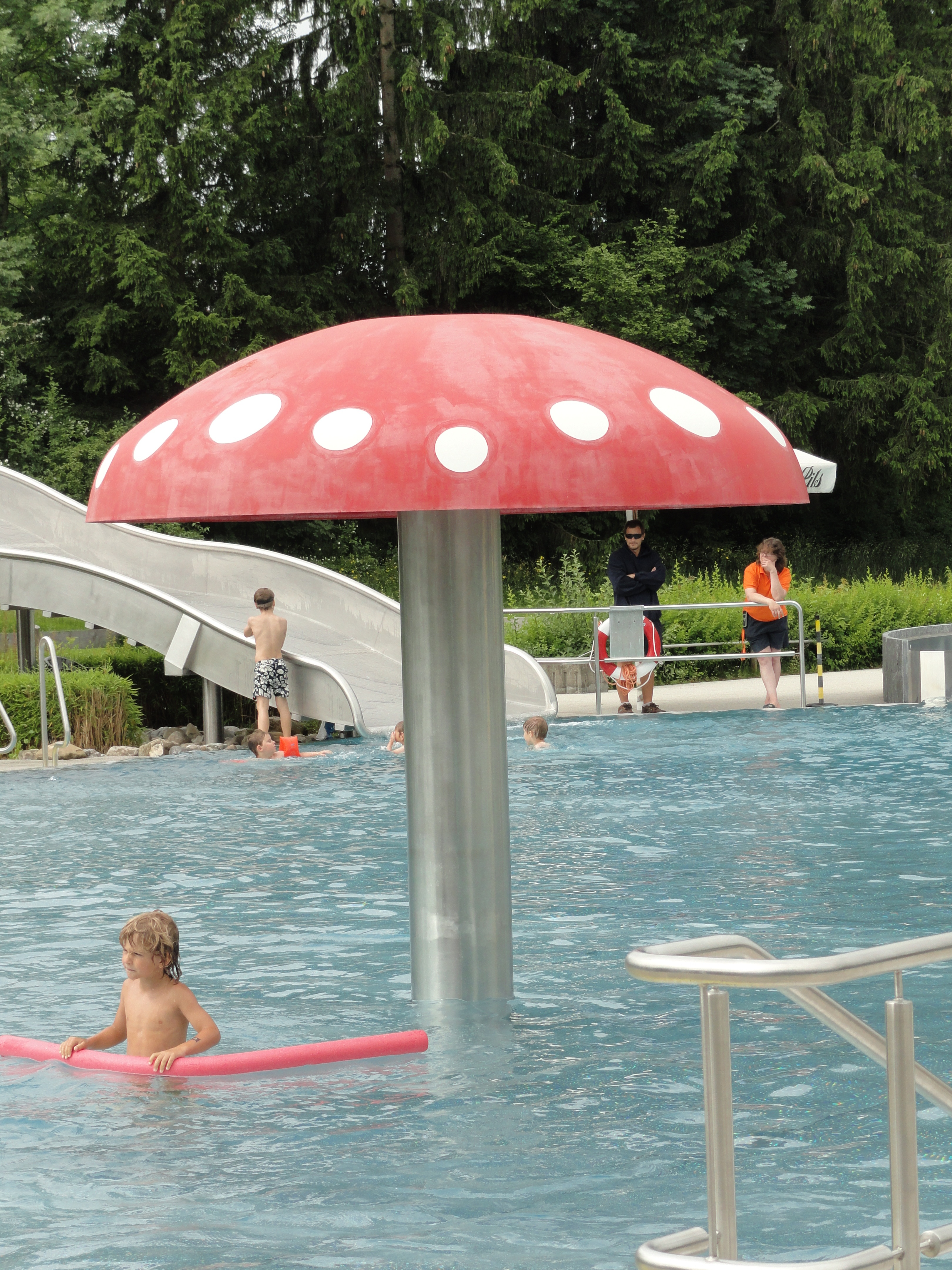 Cambomare, Kempten